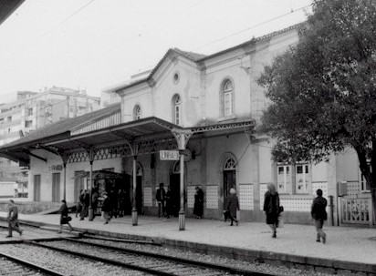 Estação da Amadora, Portugal (já com os mamarrachos do J. Pimenta, ainda sem o quiosque).